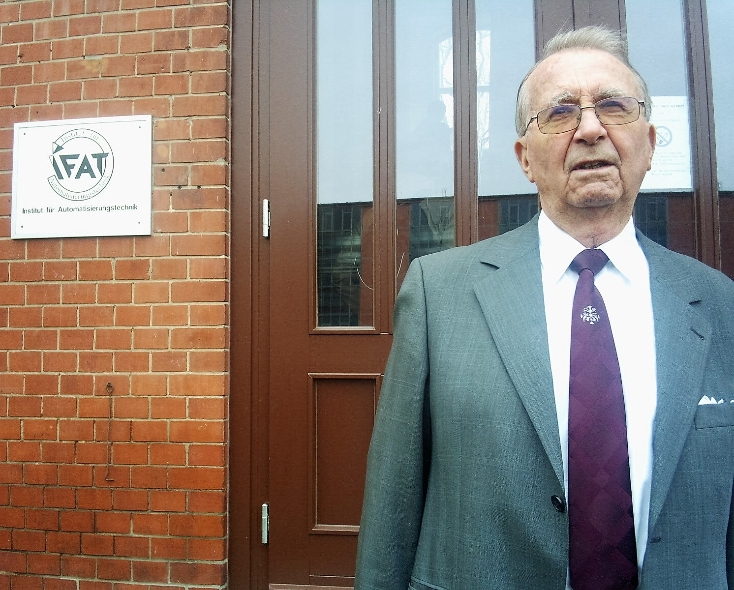 Herbert Ehrlich - Gründungsassistent im Institut für Regelungstechnik (2008)